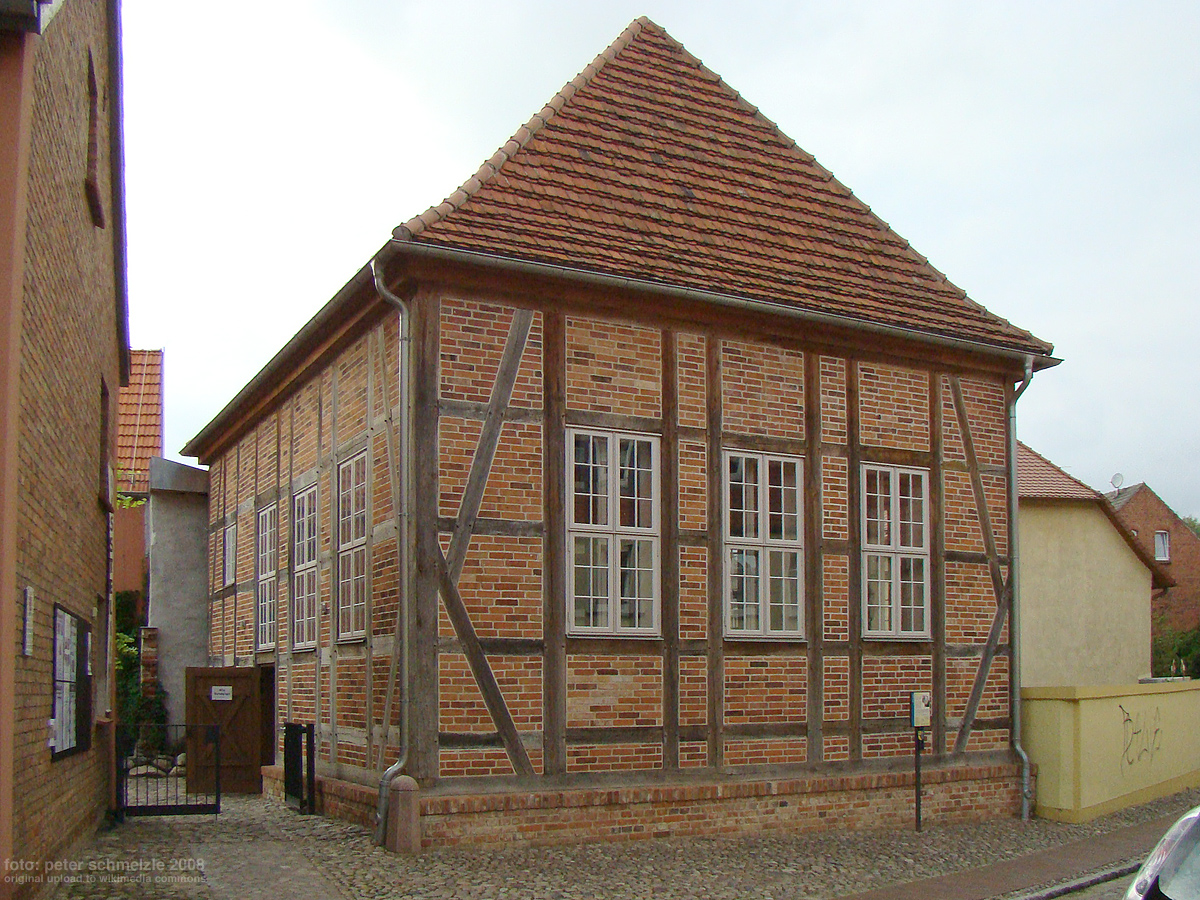 Ehemalige Synagoge in Röbel